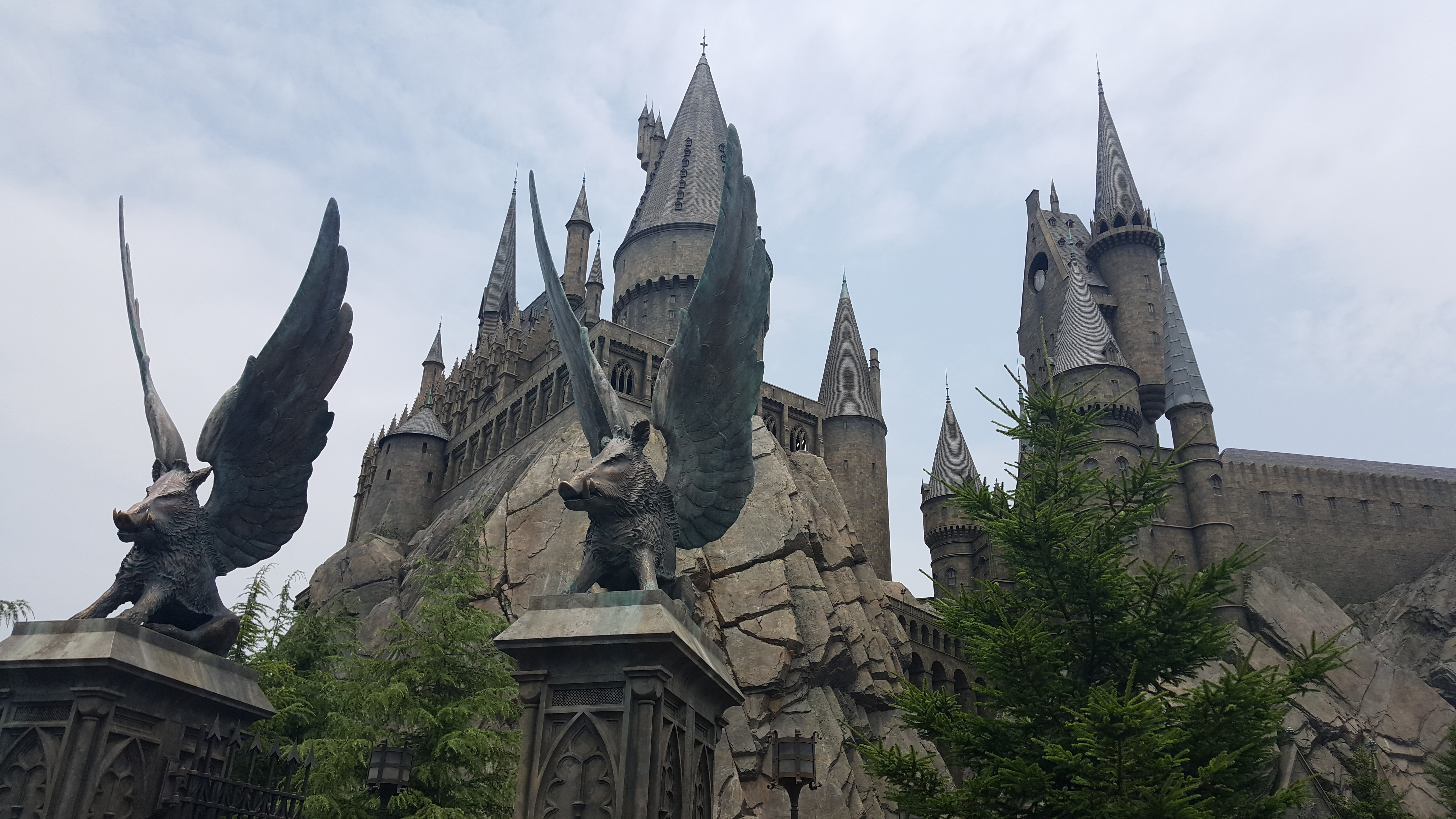 2016년 6월 유니버셜스튜디오 재팬의 해리포터 성